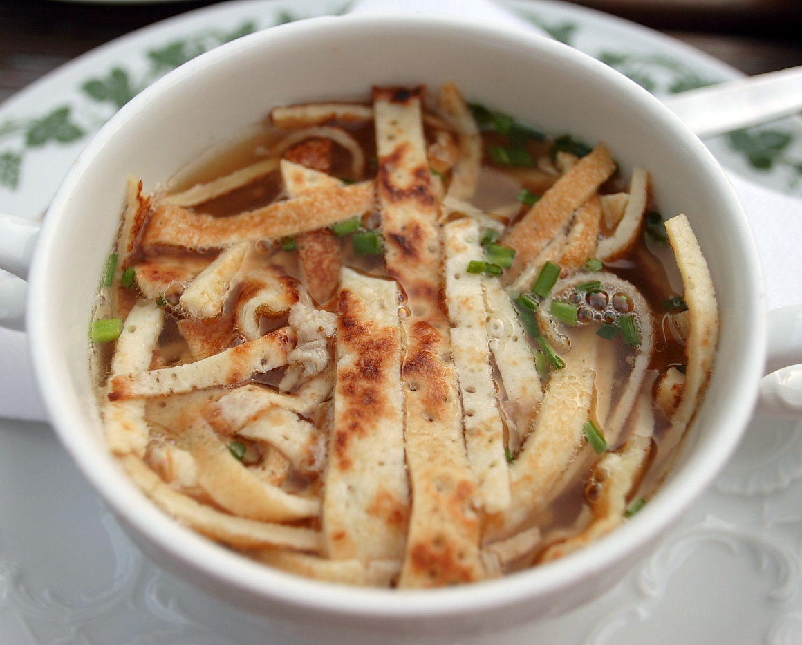 Fritattensuppe